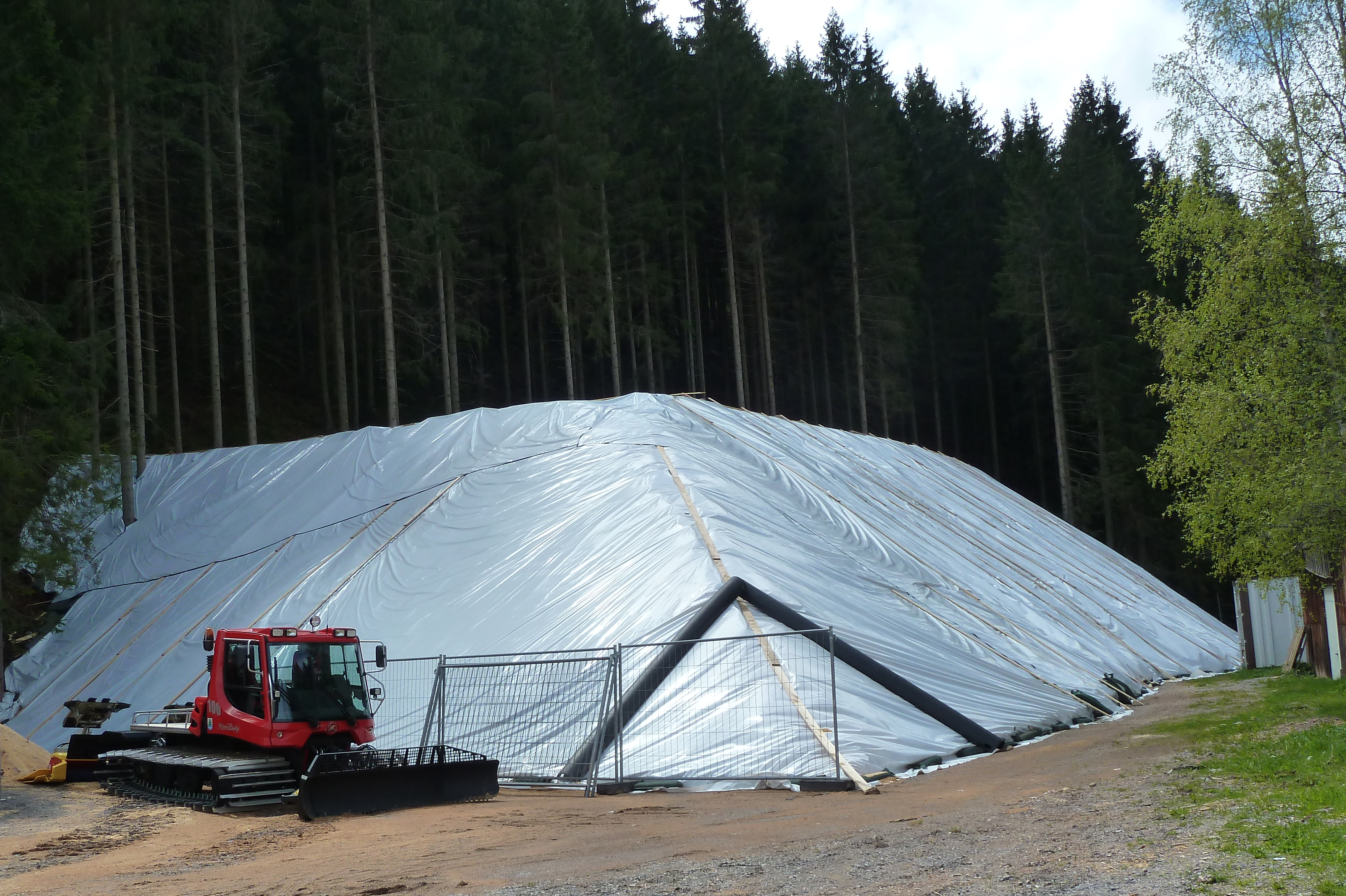 Schneehaufen zum Übersommern neben der Hochfirstschanze in Titisee-Neustadt